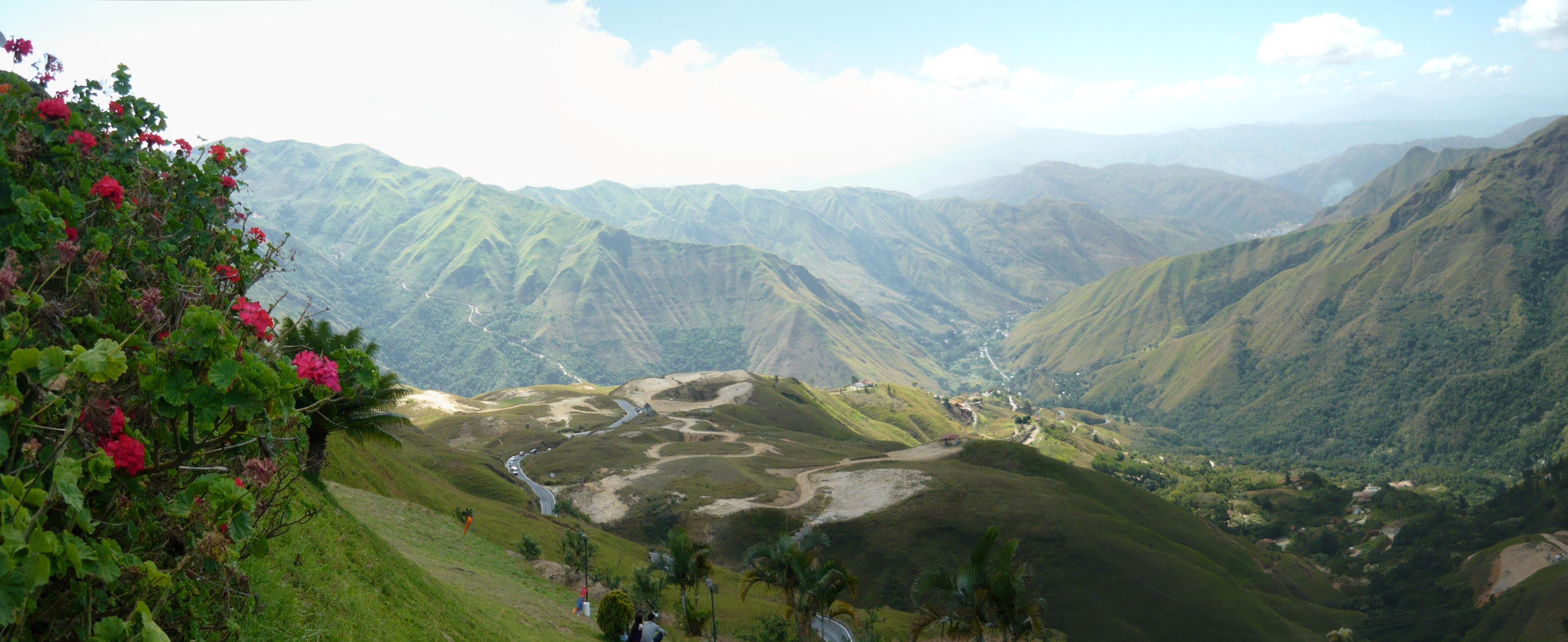 Paragliders area - Colonia Tovar. Aragua